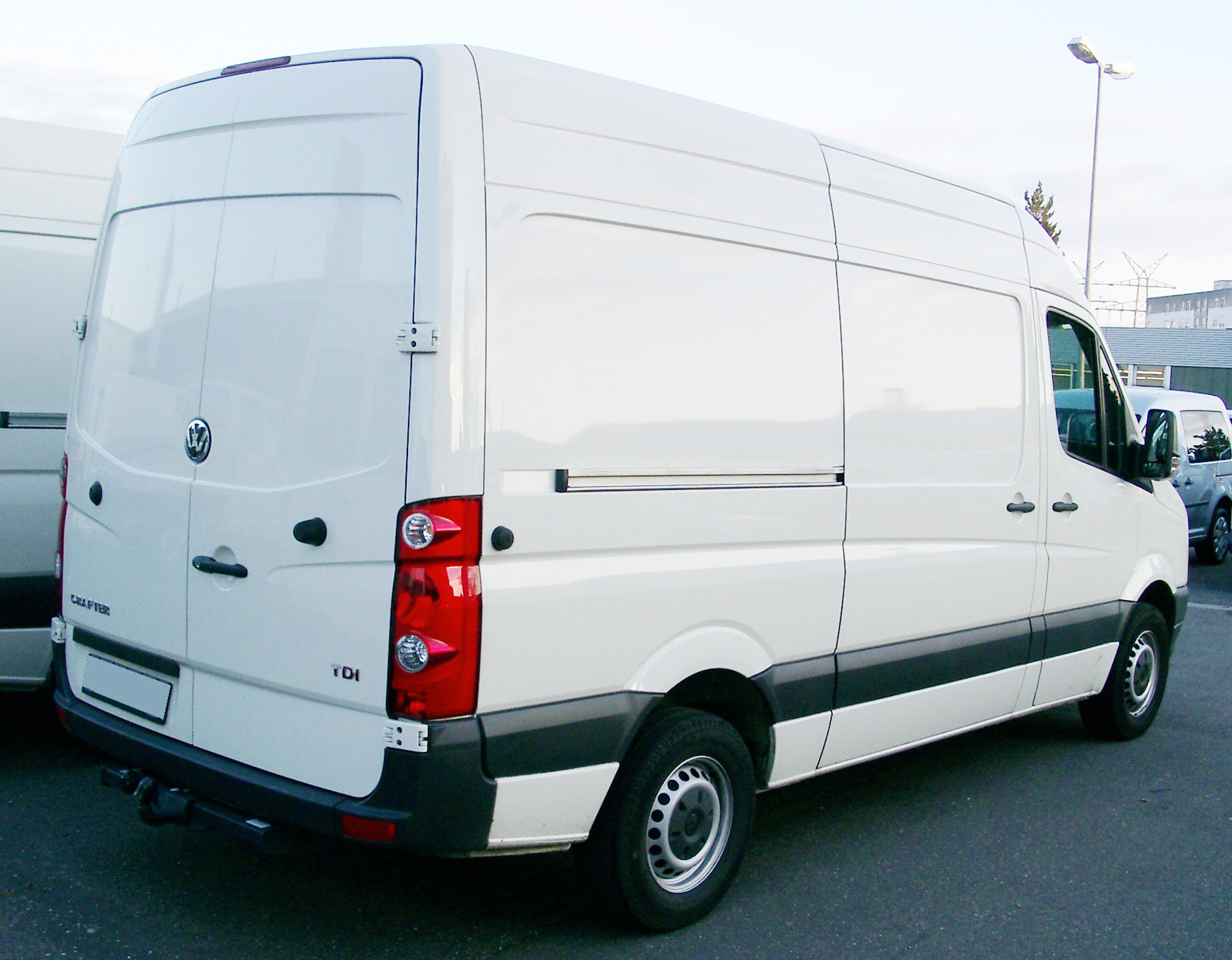 VW Crafter